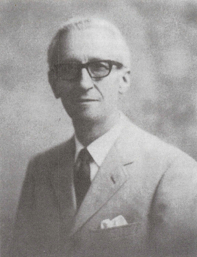 Angelo Bottigelli, fondatore dell'associazione La Famiglia Bustocca.